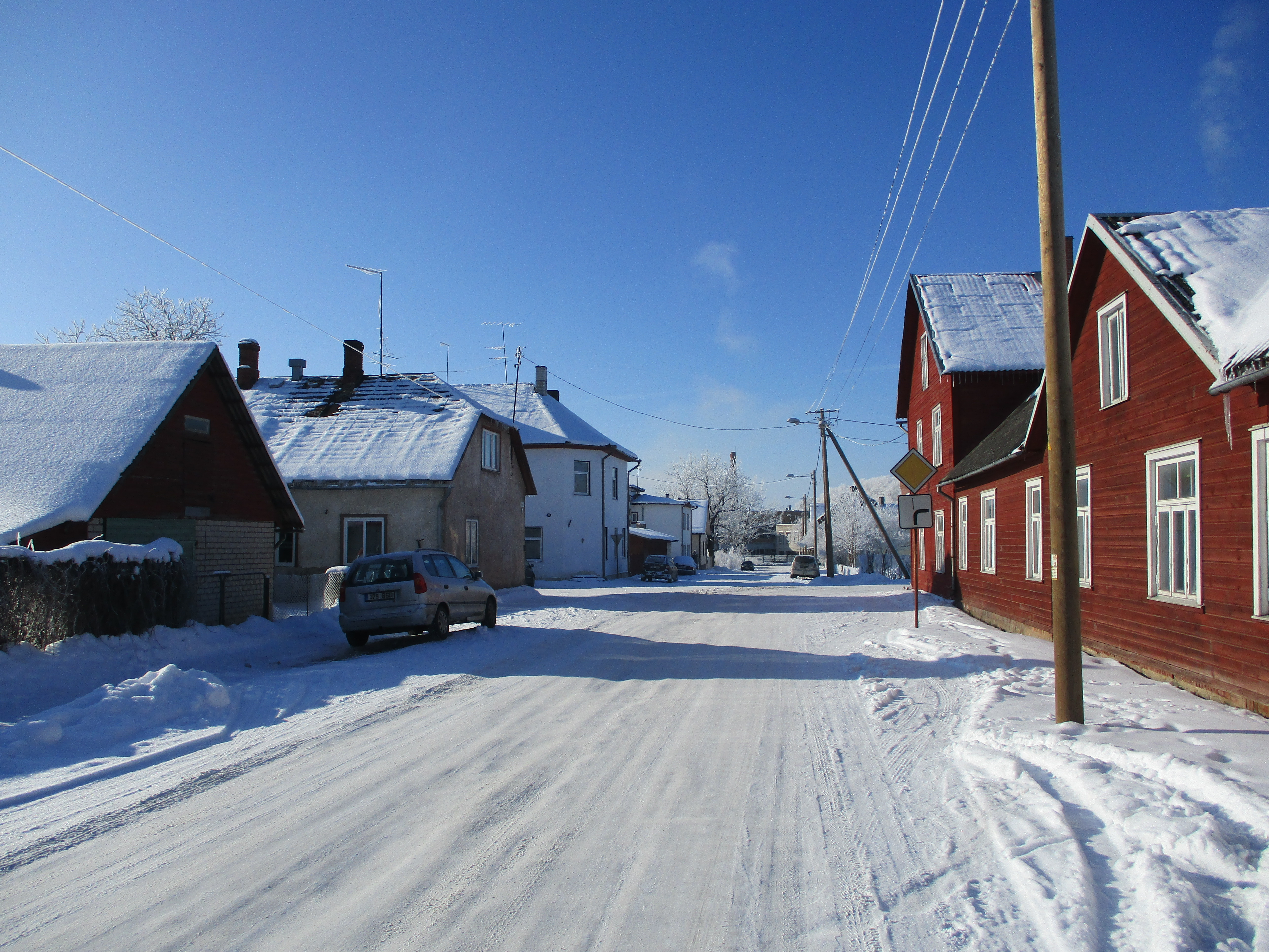 Vaade Terase tänavalt lääneedelasse, endise tikuvabriku ja raudteejaama suunas.